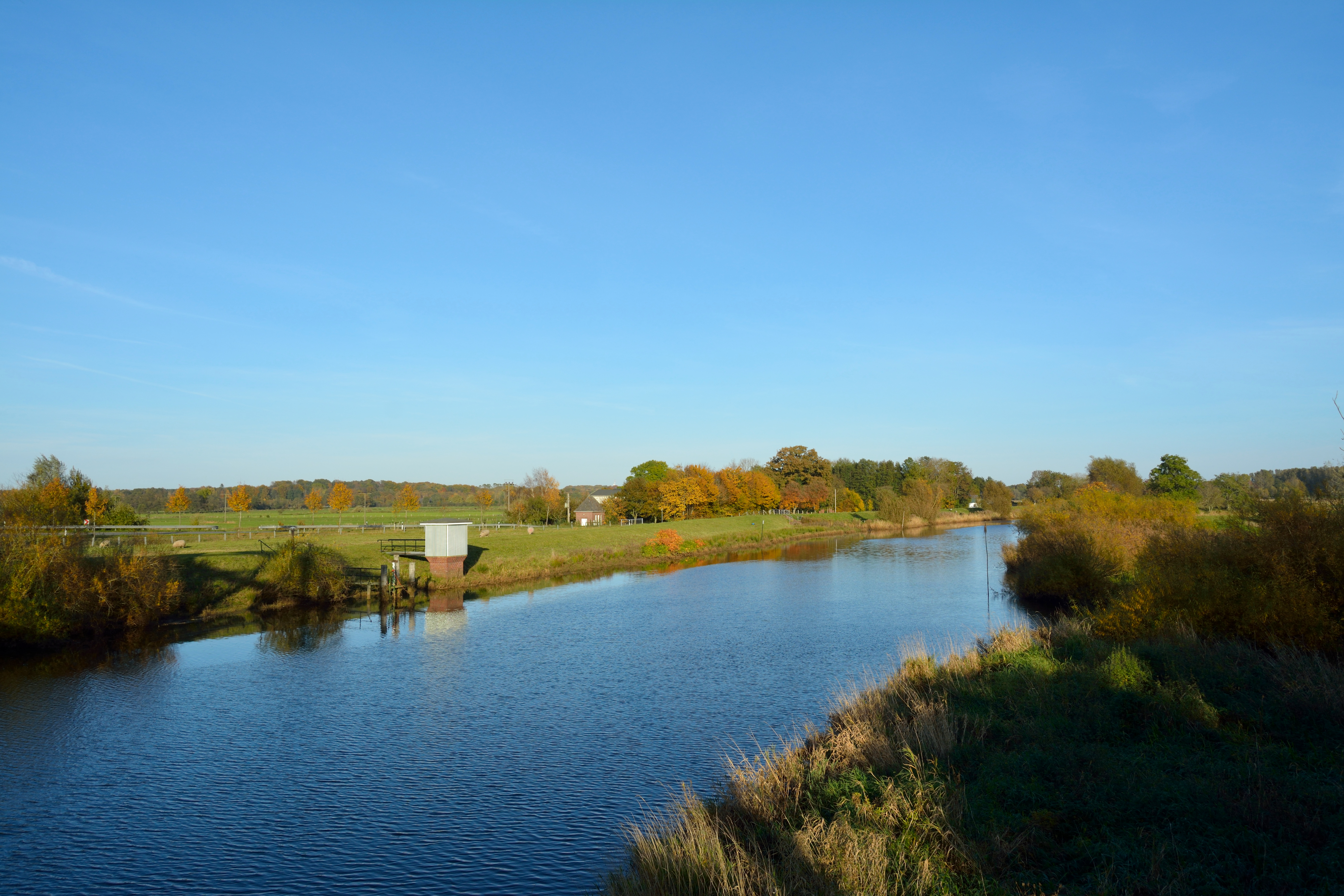 Impressionen der Stör in Wittenbergen